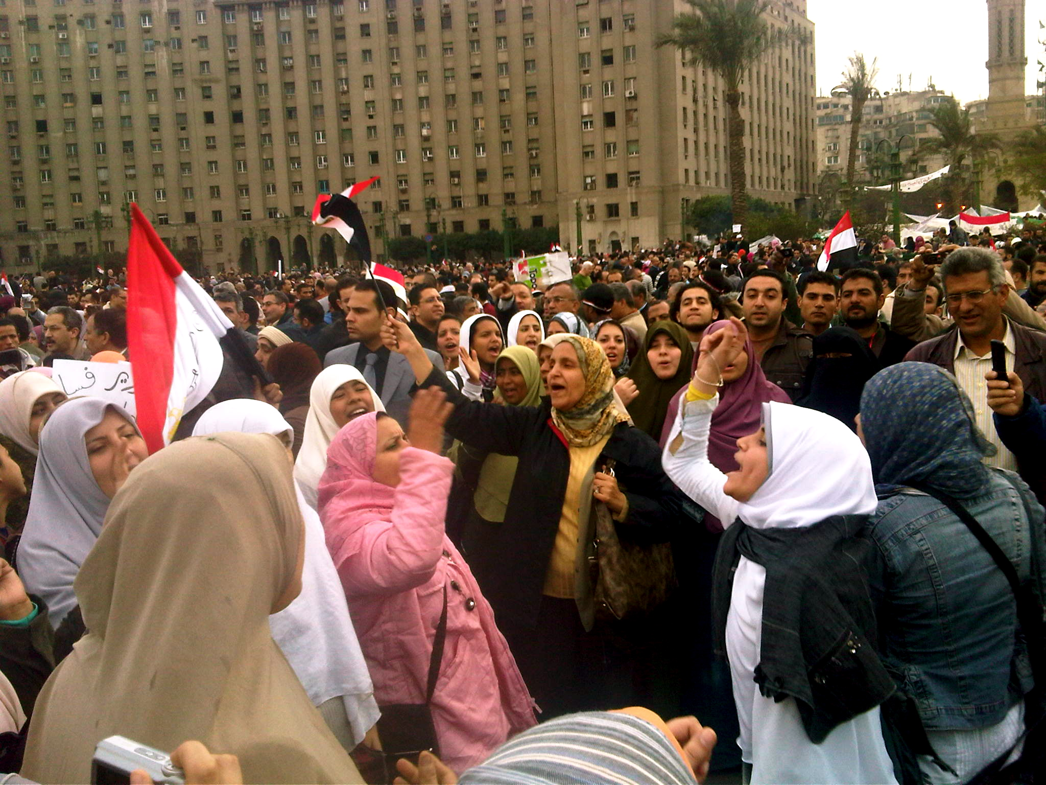 Women protesters